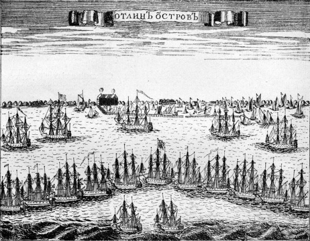 ПРОСПЕКТ РОССИЙСКОГО ФЛОТА ПРИ КОТЛИНЕ ОСТРОВЕ 1715, офорт